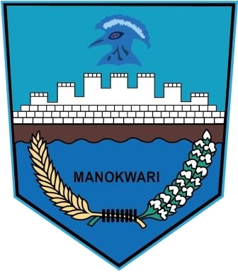 Lambang Kabupaten Manokwari, Provinsi Papua Barat, Republik Indonesia.